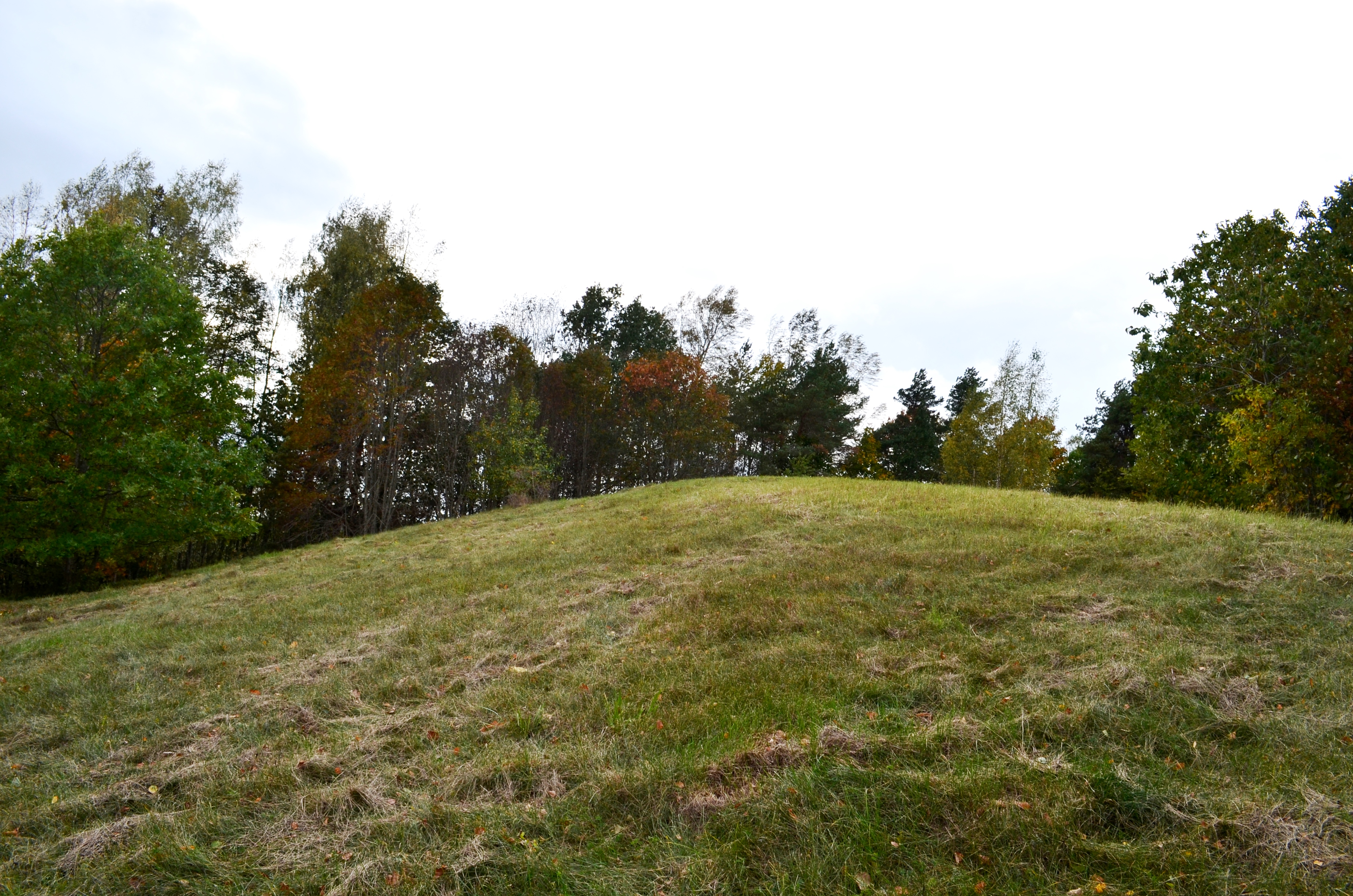 Žąsūgalos kalnas, viršūnė, Telšių raj.